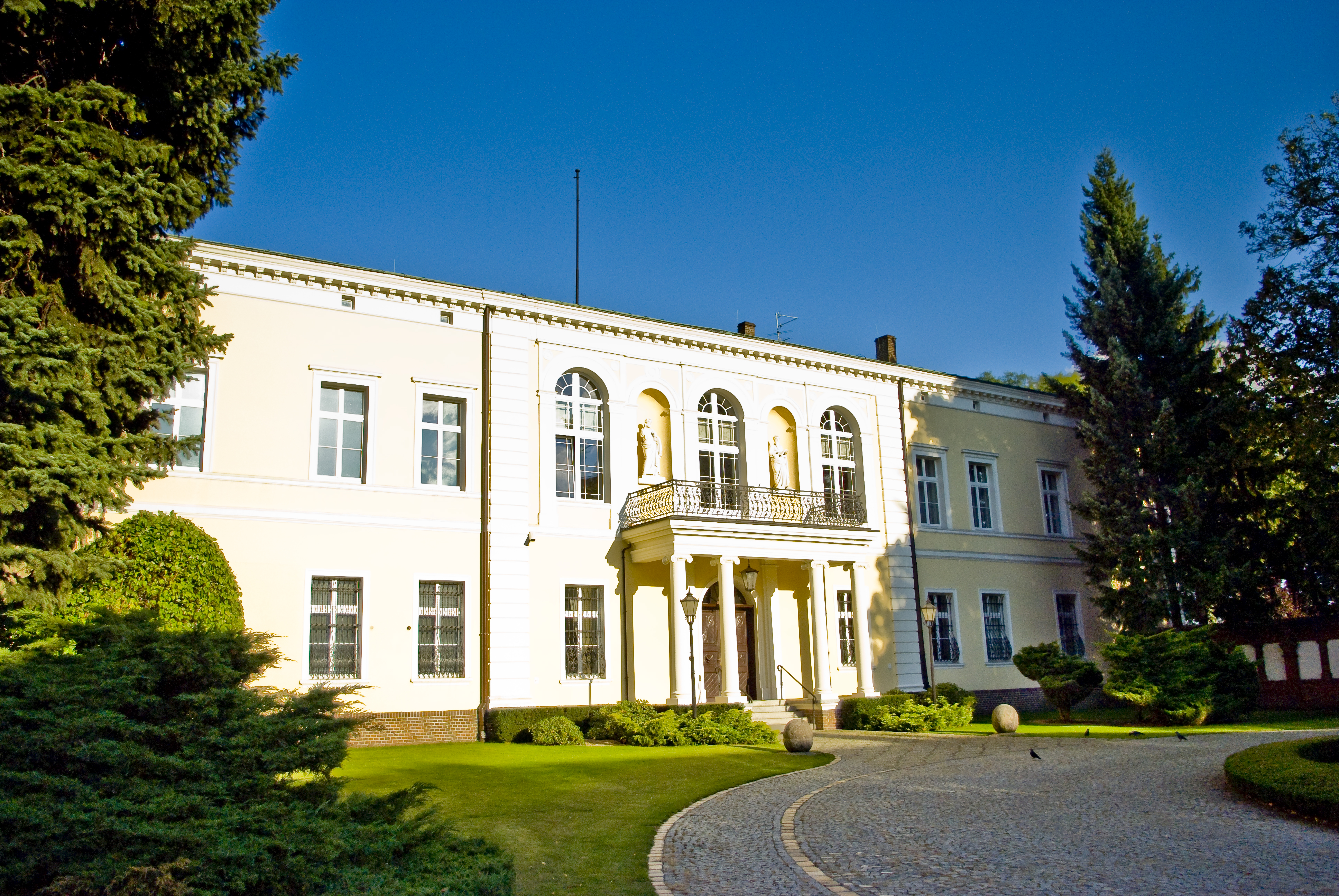 Poznań, ul. Ostrów Tumski 1 - pałac arcybiskupi na Ostrowie Tumskim (zabytek nr A 026)